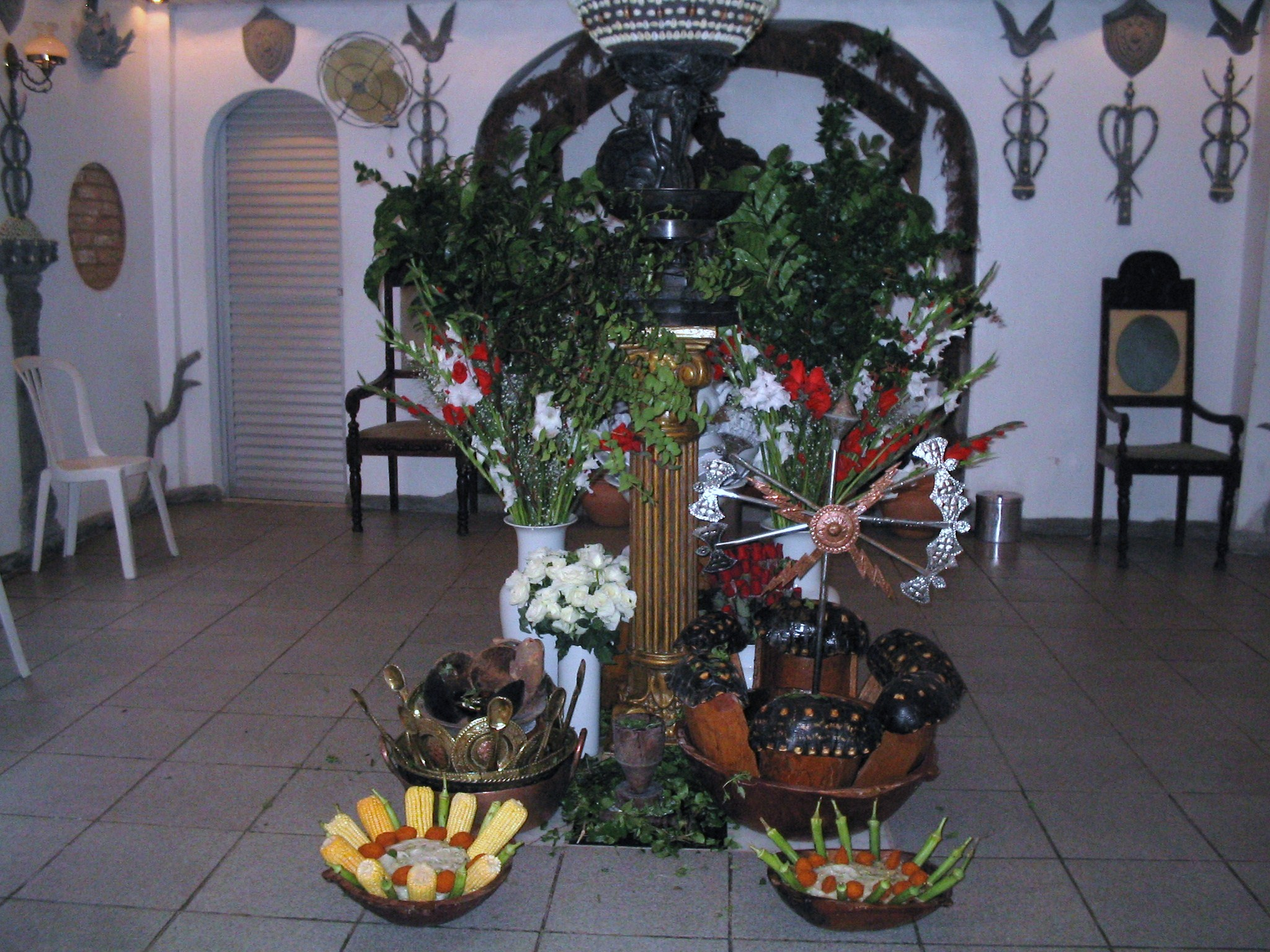 Acento de Xango e Oba